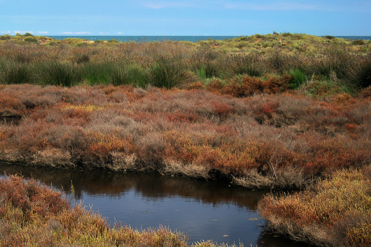 Els Muntanyans